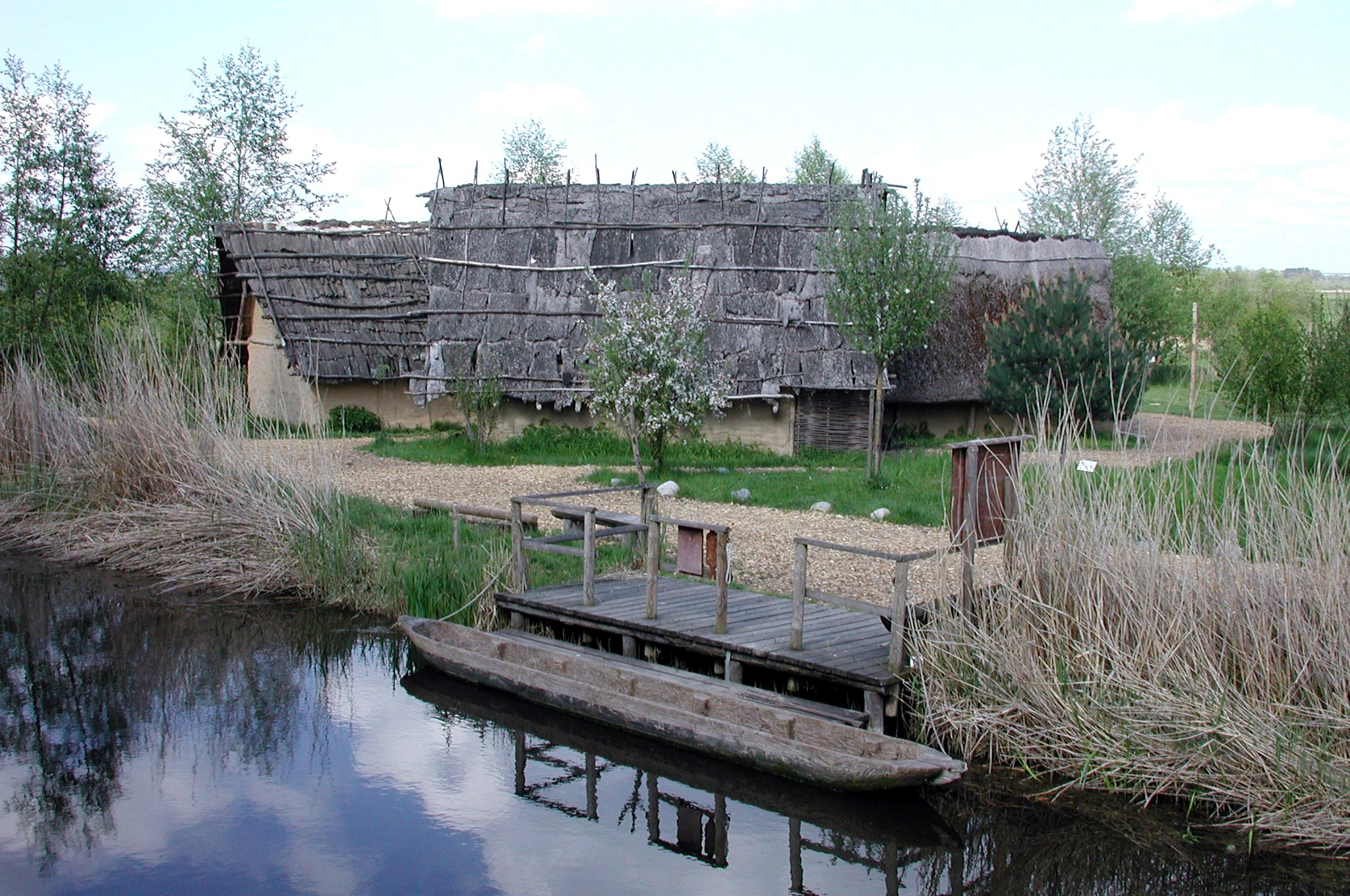 Inmitten der faszinierenden Moorlandschaft bietet das Federseemuseum im Freigelände zwölf rekonstruierte Häuser aus der stein- und bronzezeitlichen Epoche, die vom Besucher auch von innen besichtigt werden dürfen. Foto: M. Linnenbach GNU FDL